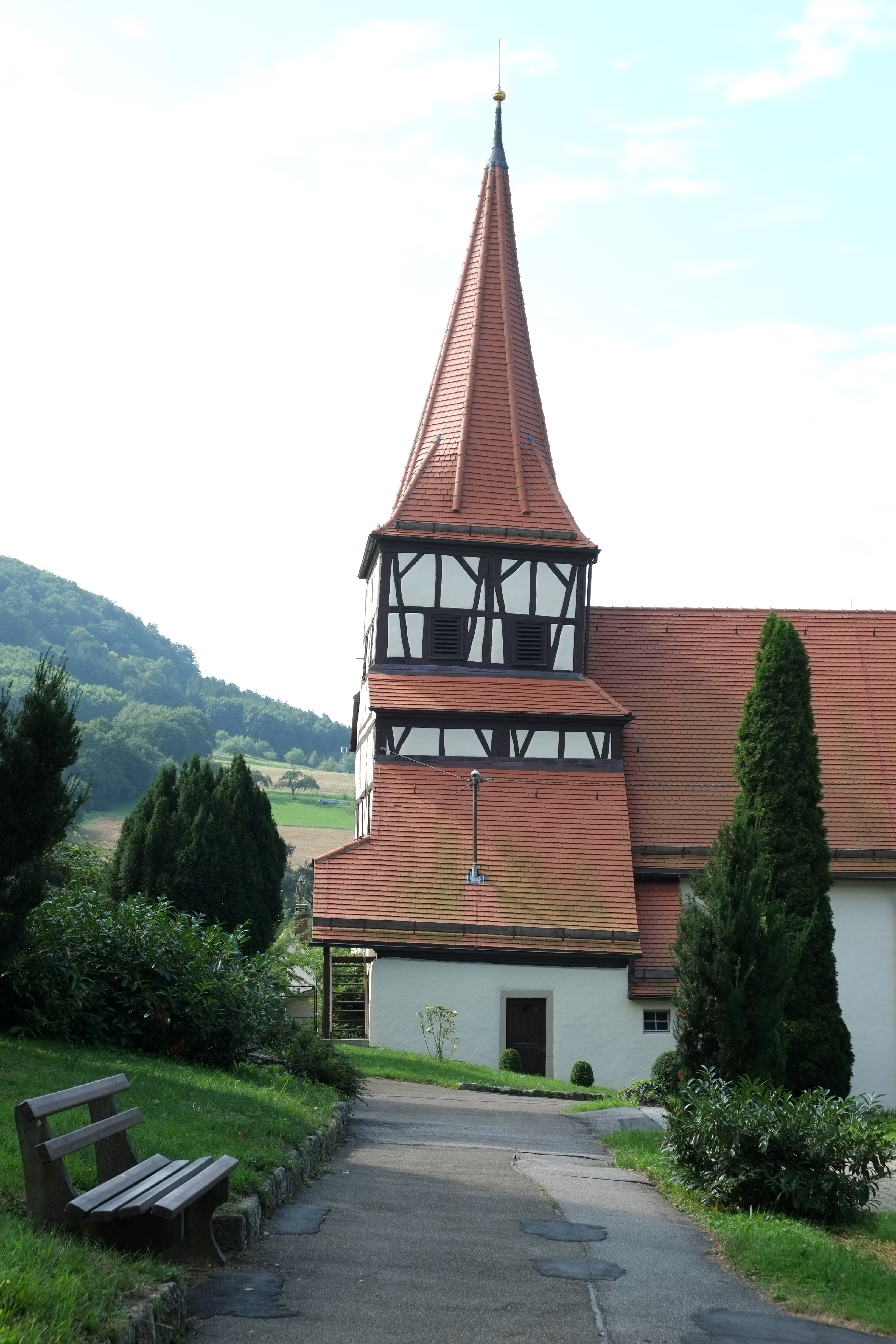 Evangelische Marienkirche in Kocherstetten, einem Stadtteil von Künzelsau im Hohenlohekreis (Baden-Württemberg, Deutschland)